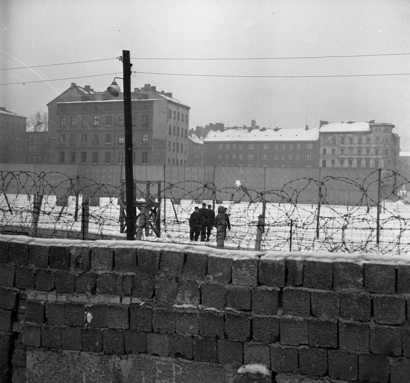 West-Berlin: Staatsbesuch Zypern. Vizepräs. Kutchuk [Kütschük] Stadtrundfahrt in der Bernauerstr.